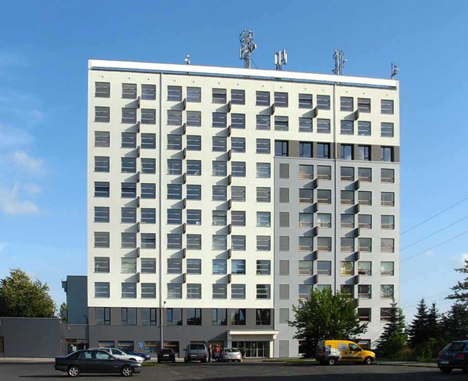 Biurowiec "Bydgosta" przy ul. Fordońskiej w Bydgoszczy (dawny biurowiec Rometu)